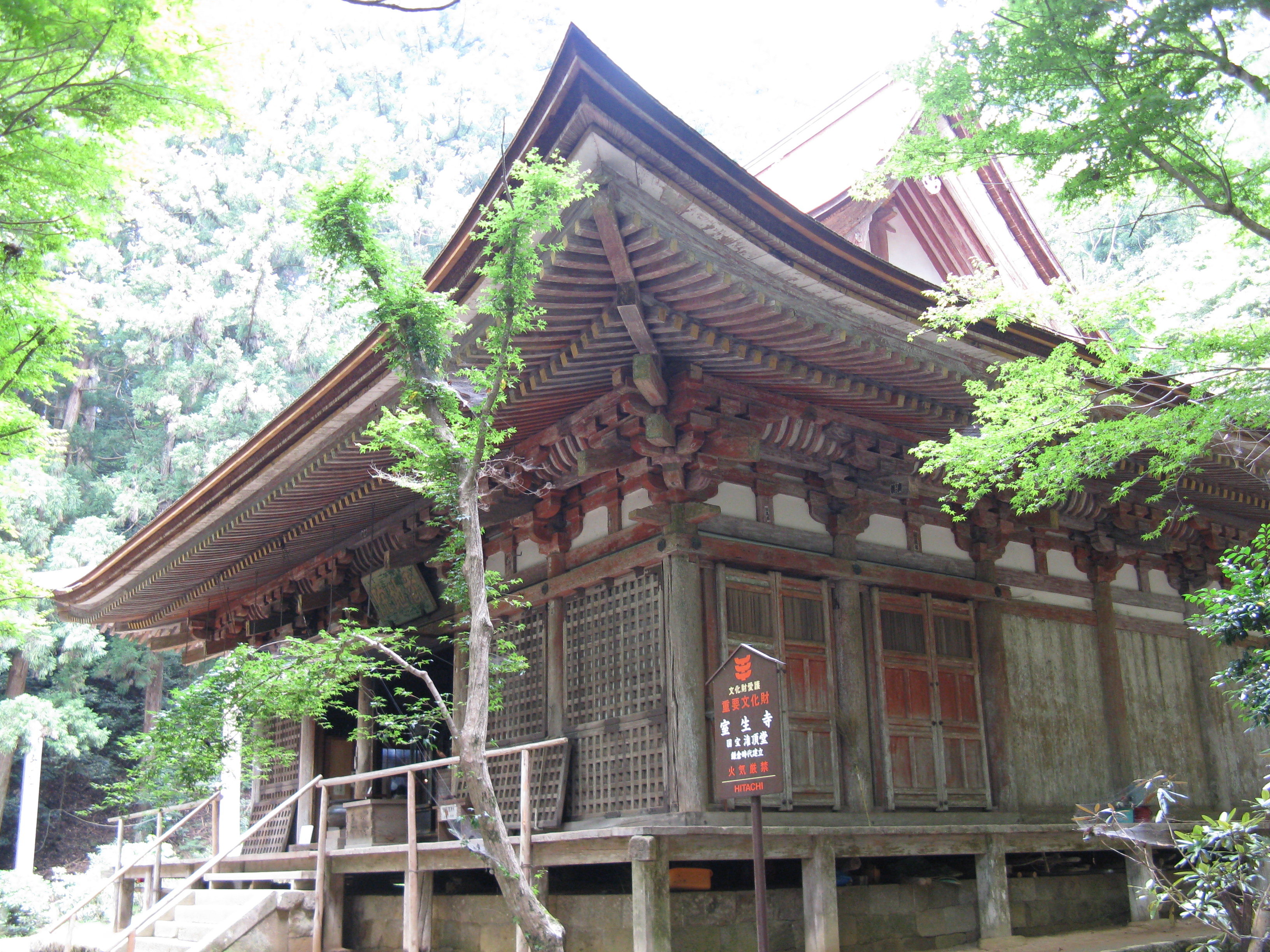 室生寺 灌頂堂